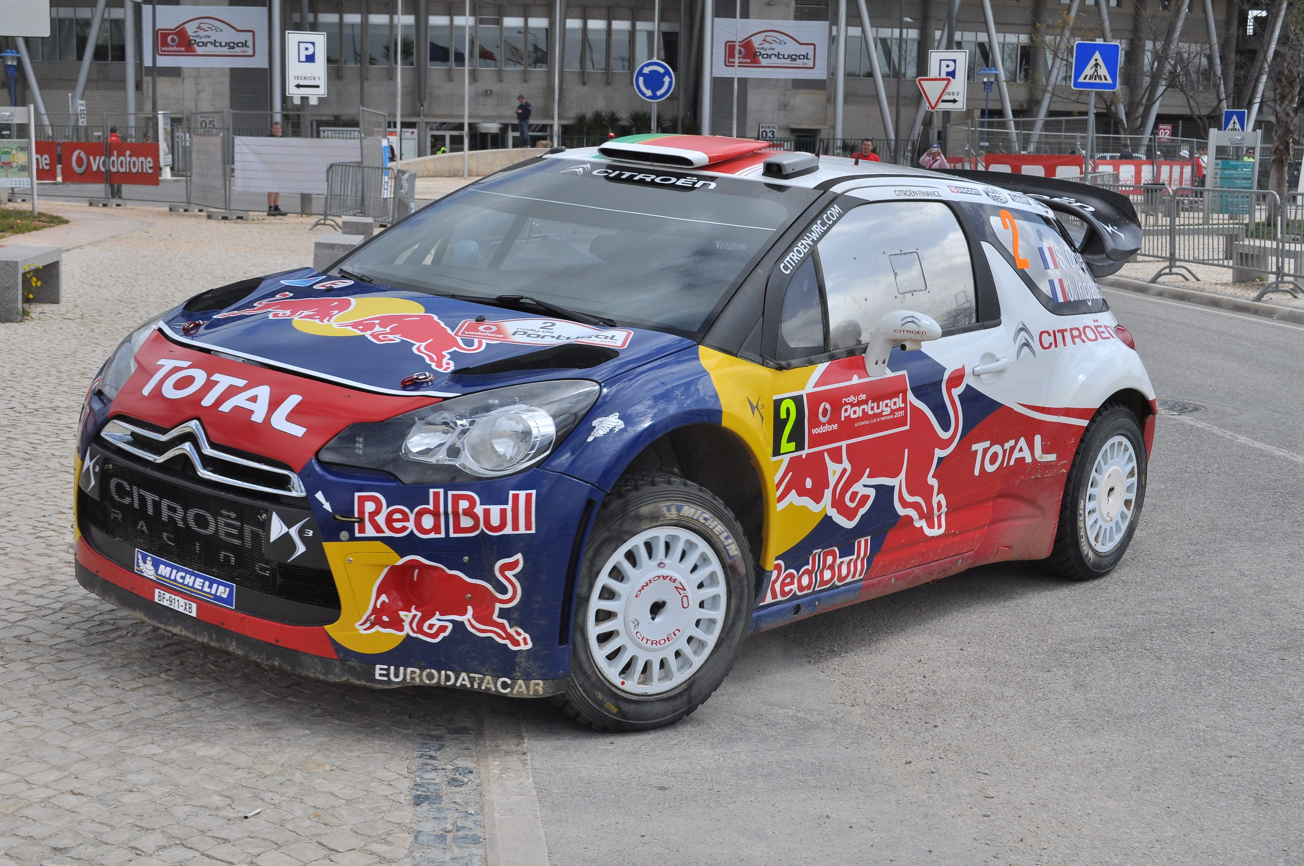 Ogier. Portugal 2011